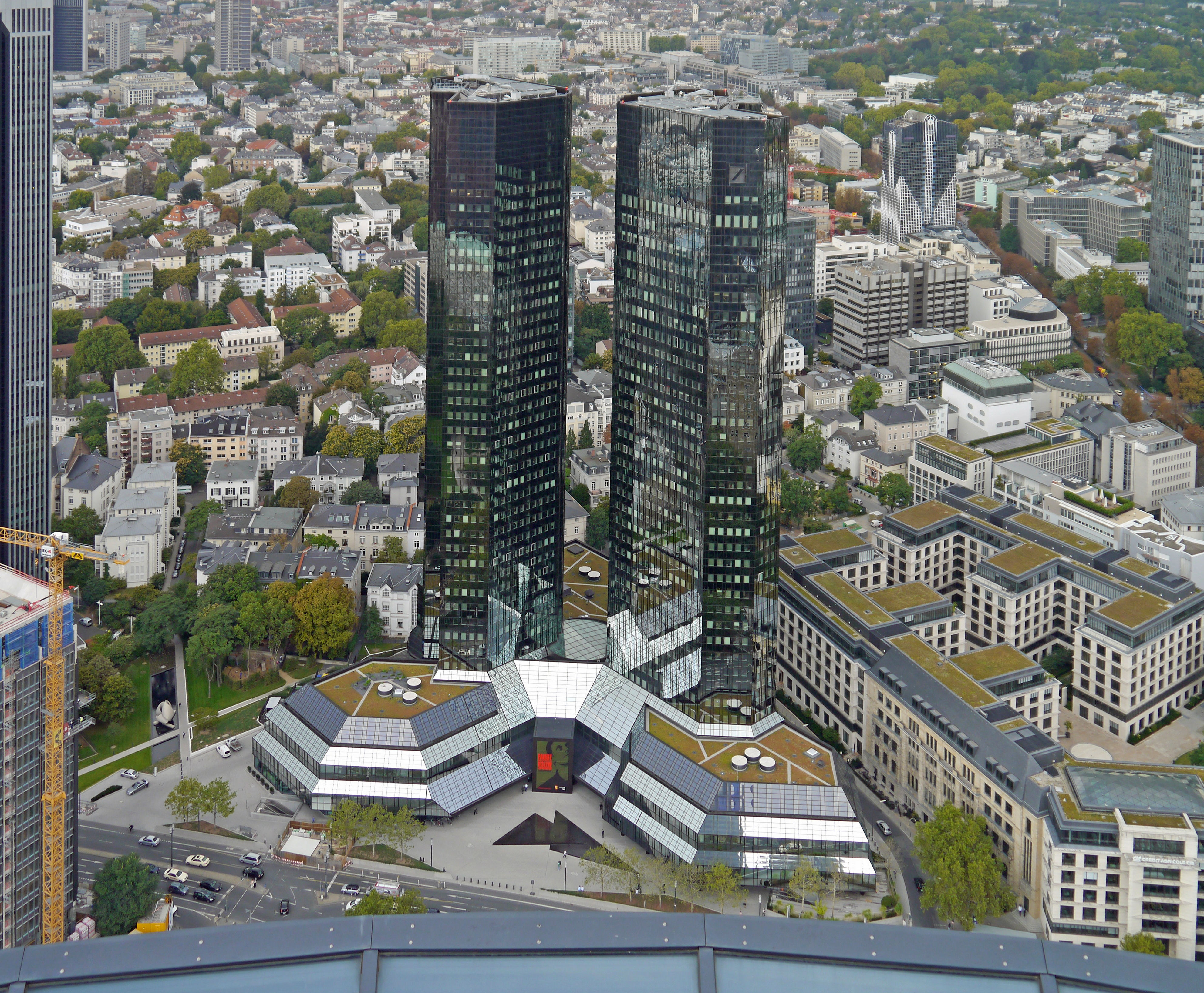 Deutsche Bank, Zentrale und Verwaltung an der Taunusanlage, 2012, Frankfurt-Innenstadt.